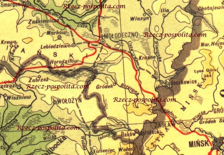 Беларуская (тарашкевіца): Мапа Маладэчна ў складзе Польшчы.